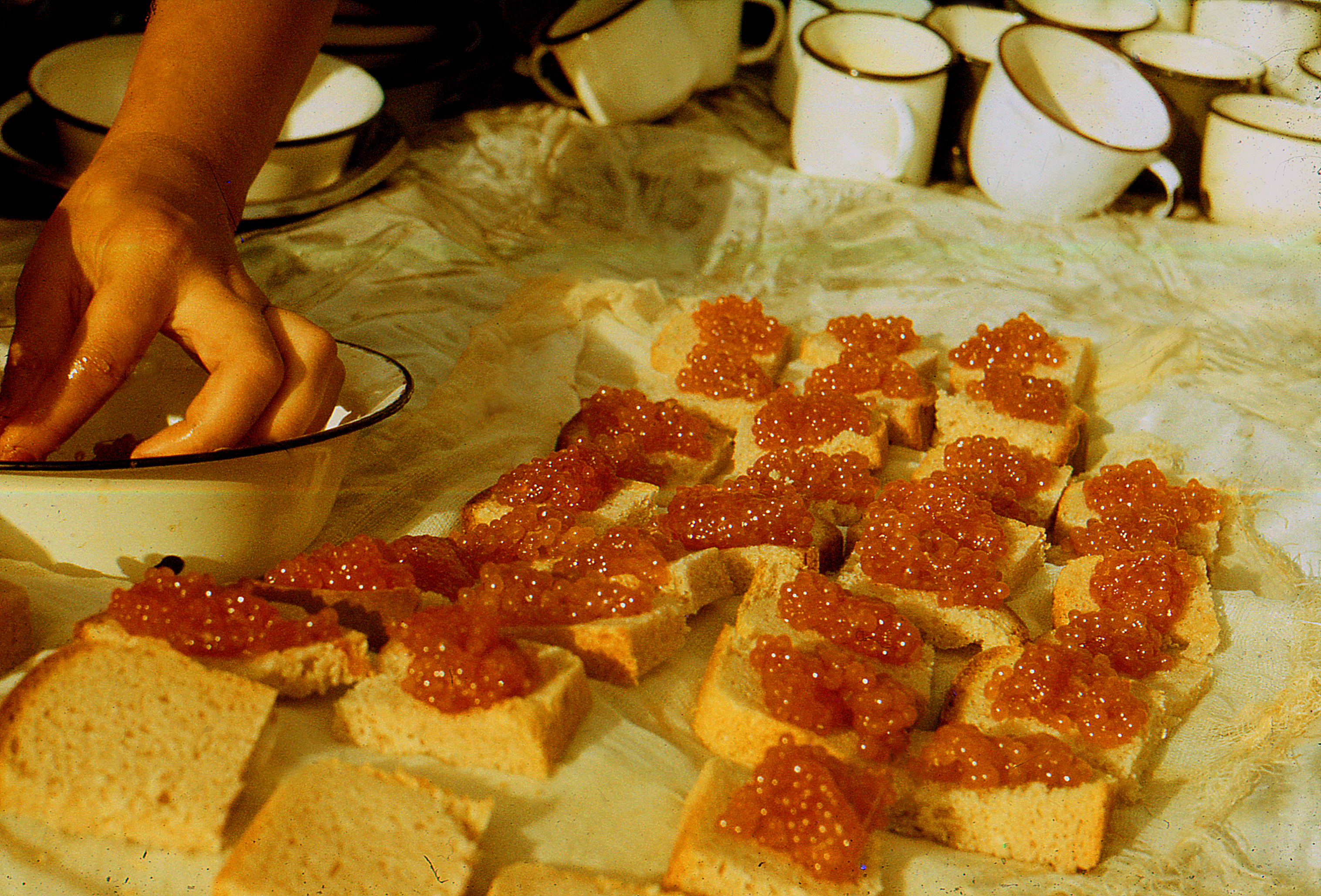 Икра горбуши.Сахалин.Залив Мордвинова.